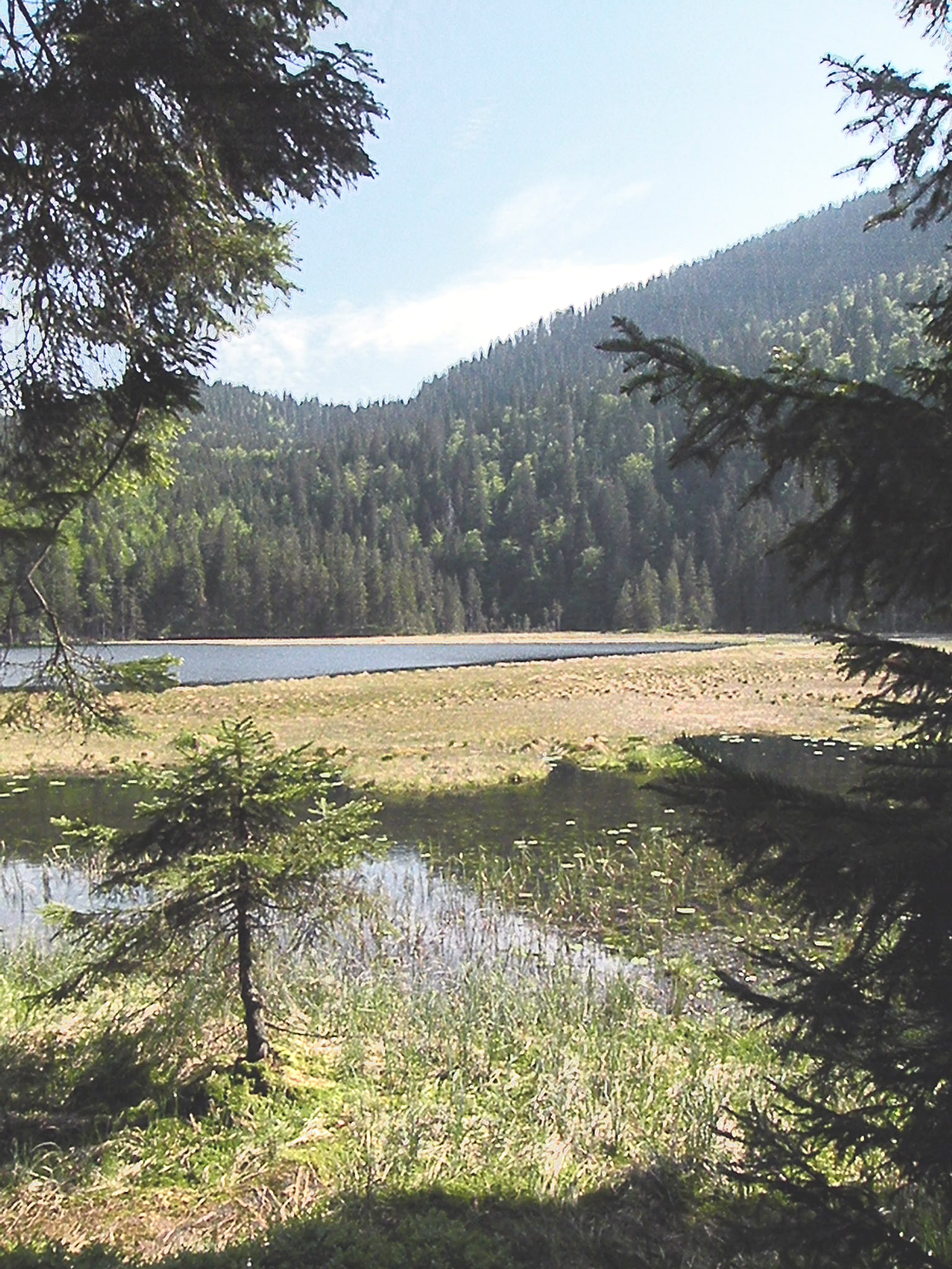 Озеро Арберзее. Реликтовый водоём, оставшийся от времени последнего обледенения Европы.